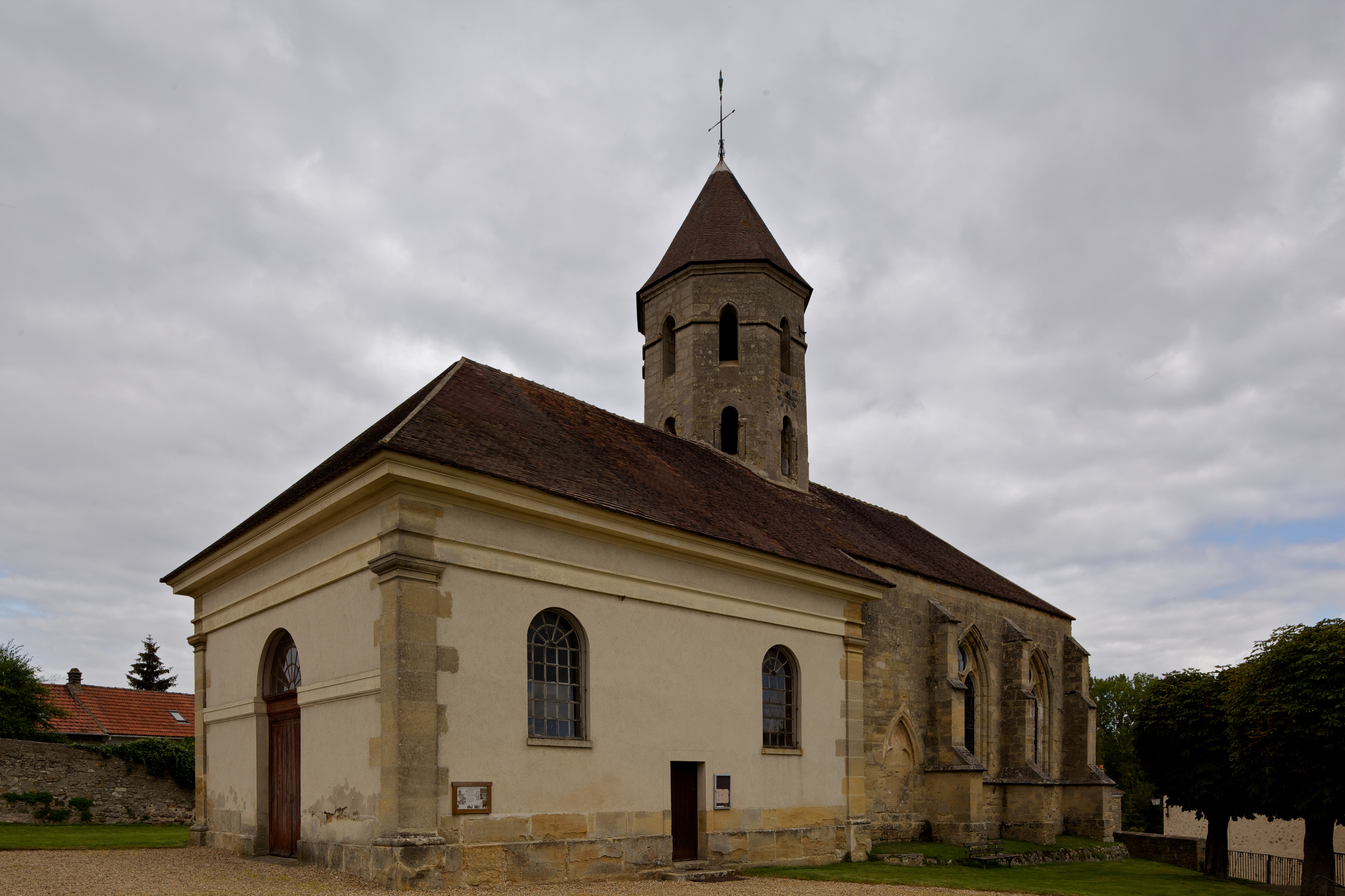 Église Saint-Pierre-ès-Liens à Condécourt (95).